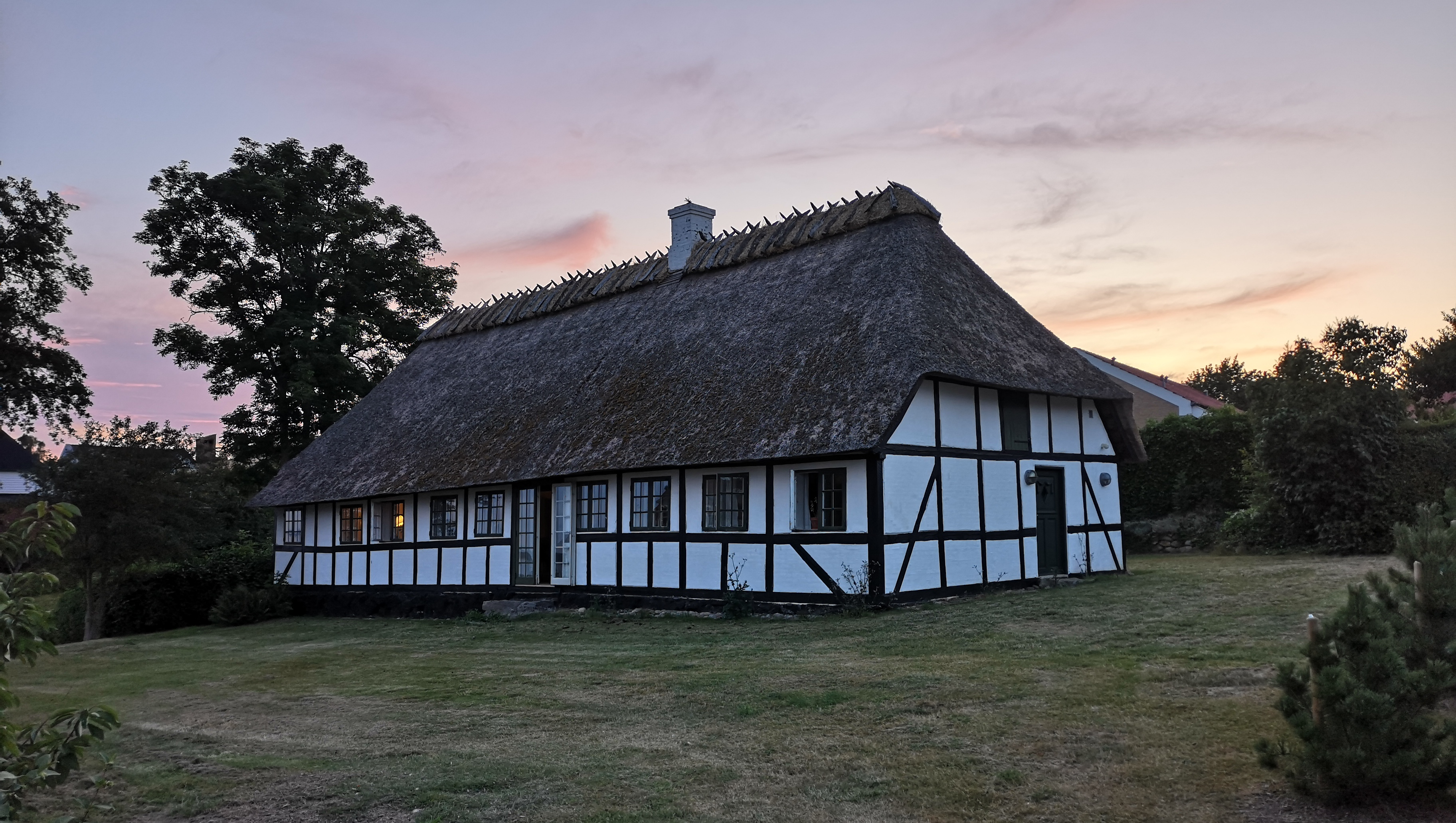 Brechts Hus, Skovsbostrand 8, Svendborg, Dänemark (Alter Fritz)